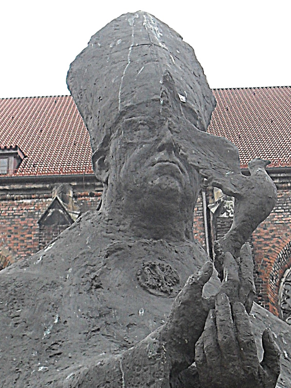 Wrocław, pomnik kardynała B. Kominka na Piasku